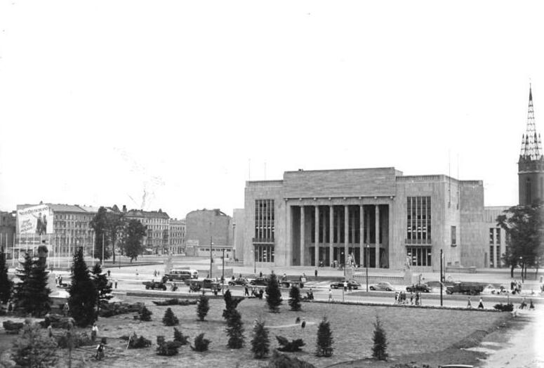 Berlin, Karl-Marx-Allee, "Deutsche Sporthalle" ADN-ZB Archiv-Illus Köhler-bor 4.8.1951 Die Deutsche Sporthalle in der Karl-Marx-Allee nach ihrer Fertigstelltung (4.8.1951) Blick auf die deutsche Sporthalle.